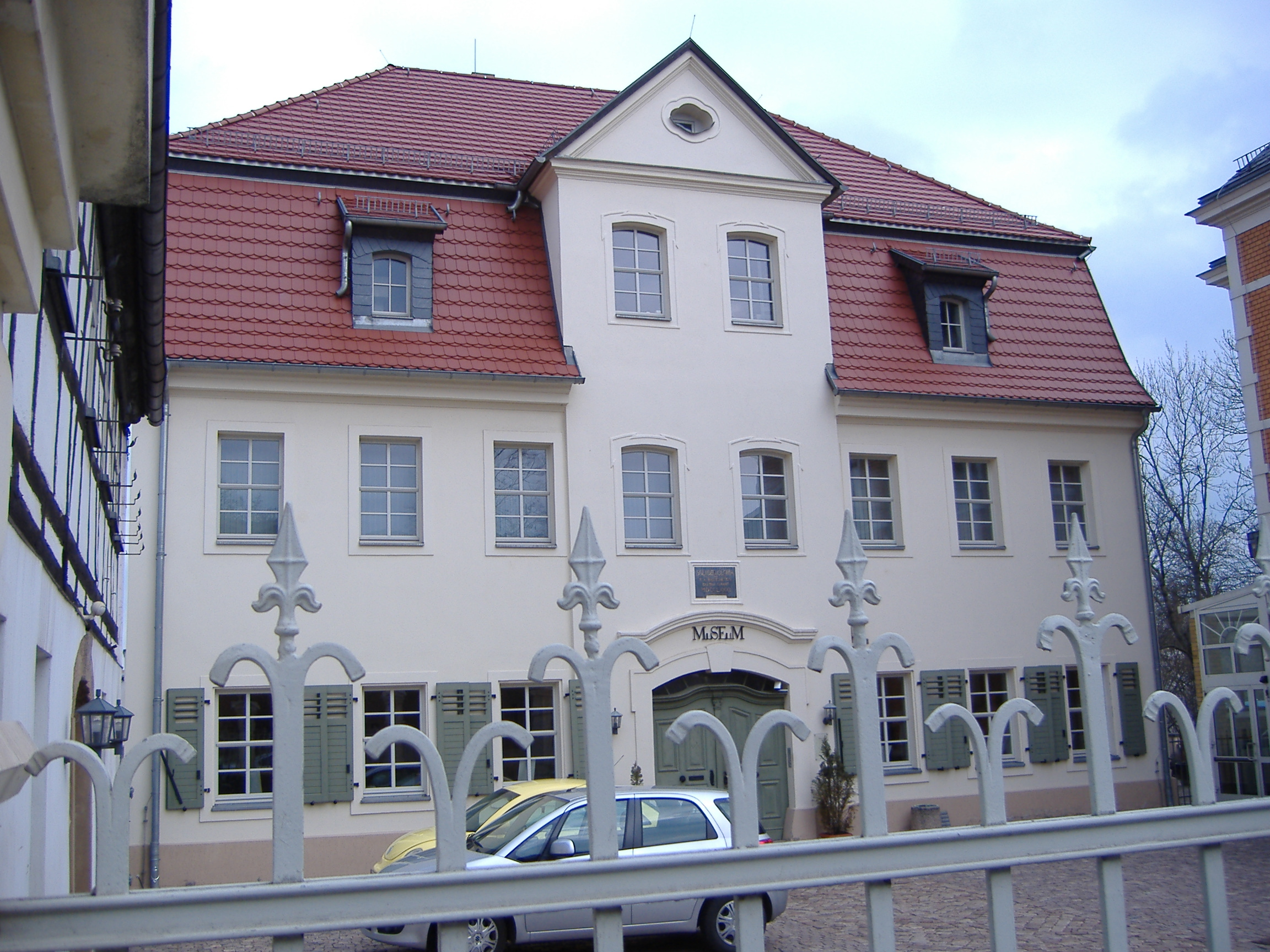 Das Foto zeigt das Stadt- und Dampfmaschinenmuseum in Werdau (Sachsen).